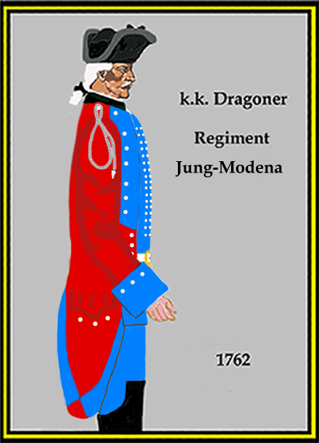 Österreichishes Dragoner-Regiment „Jung-Modena“ 1762 (Aus: L.& F. Funcken - „L'Uniforme et les Armes des soldats de la guerre en dentelle II“) Castermann (Tournai 1976)